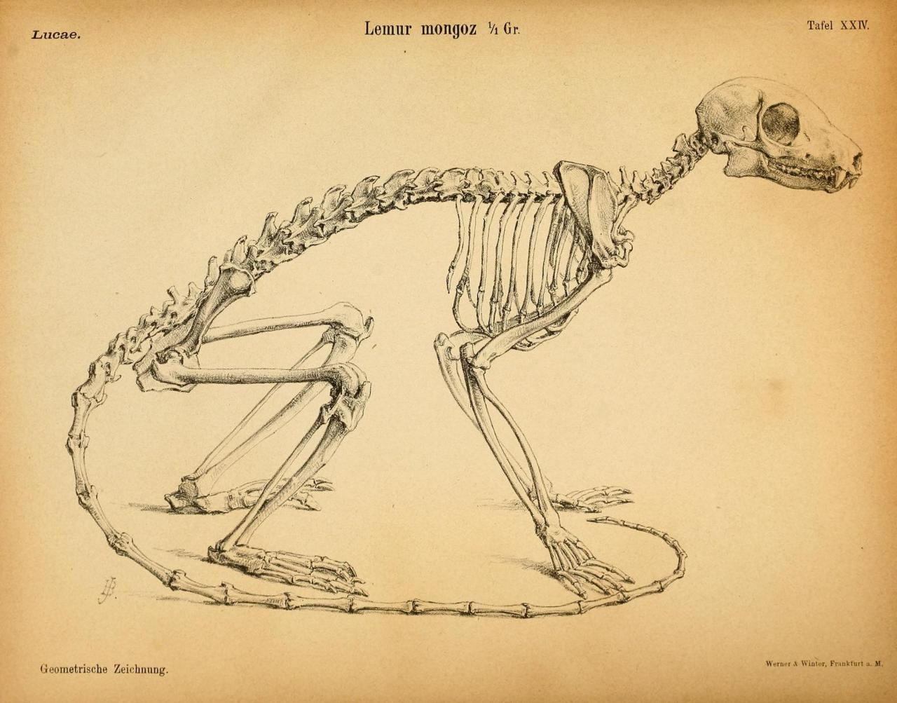 Skelett eines Lemuren von Johann Christian Gustav Lucae, aus: Die Statik und Mechanik der Quadrupeden. Dr. Johann Christian Gustav Lucae, 1883.